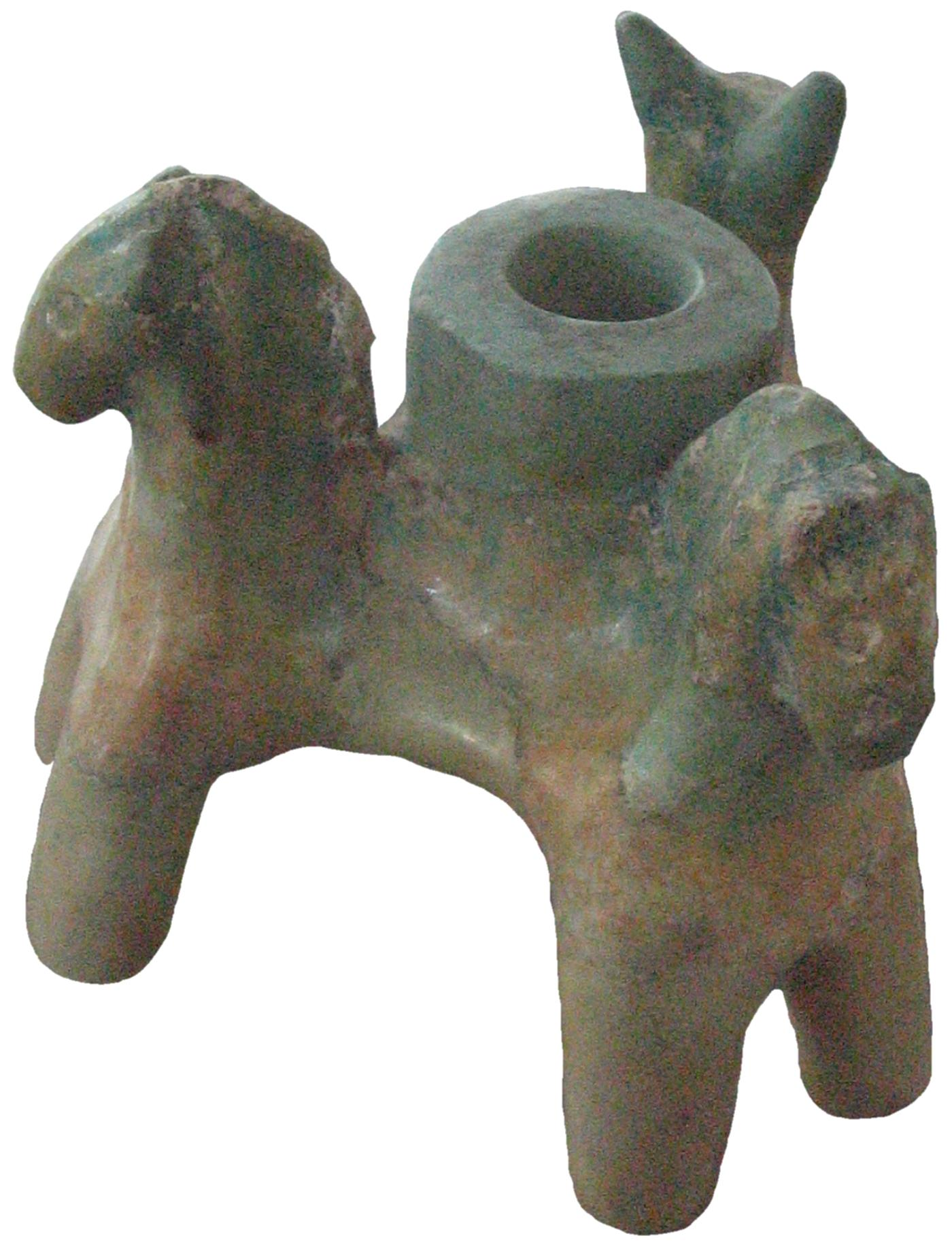 Bougeoir céramique, Suse, Sassanide. National Museum of Iran.